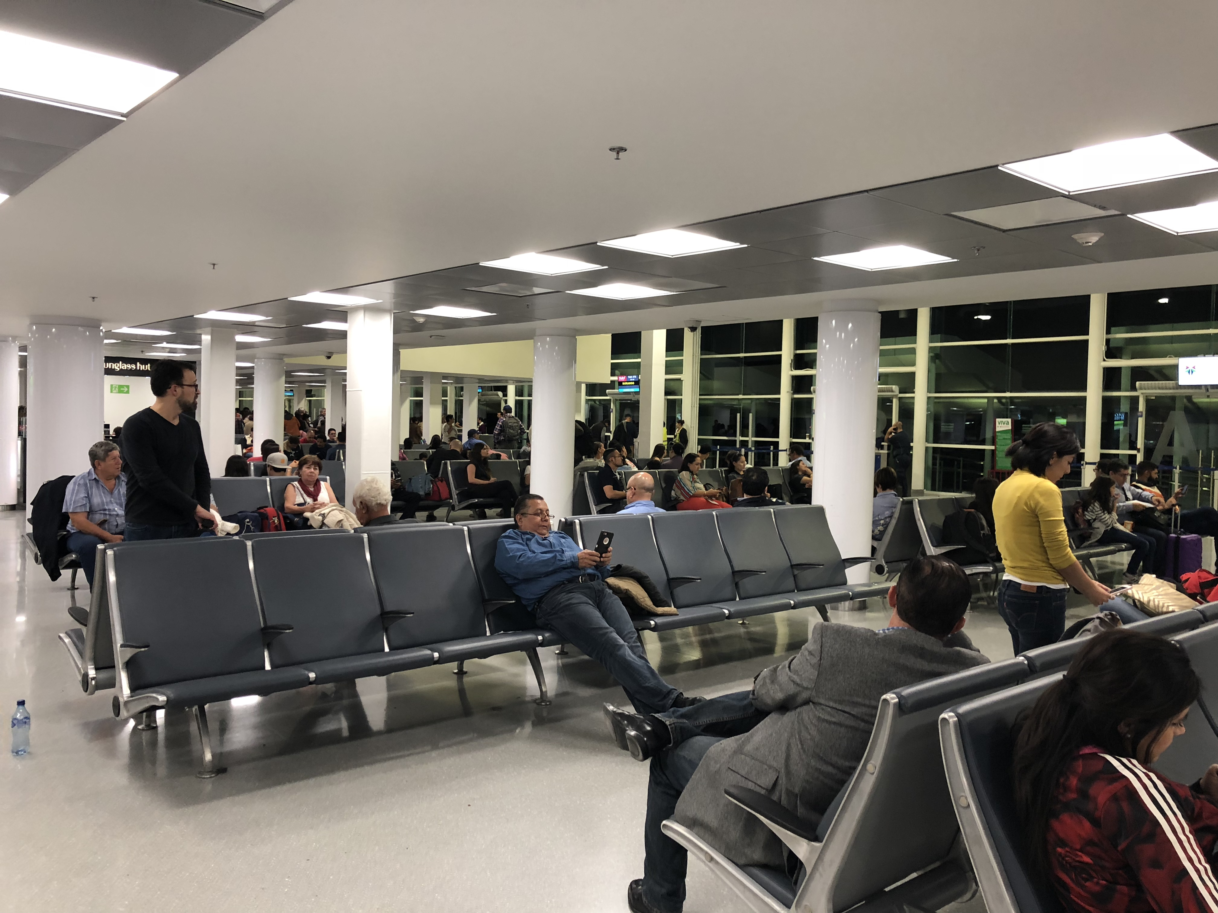 Sala A del Aeropuerto Internacional de Guadalajara.